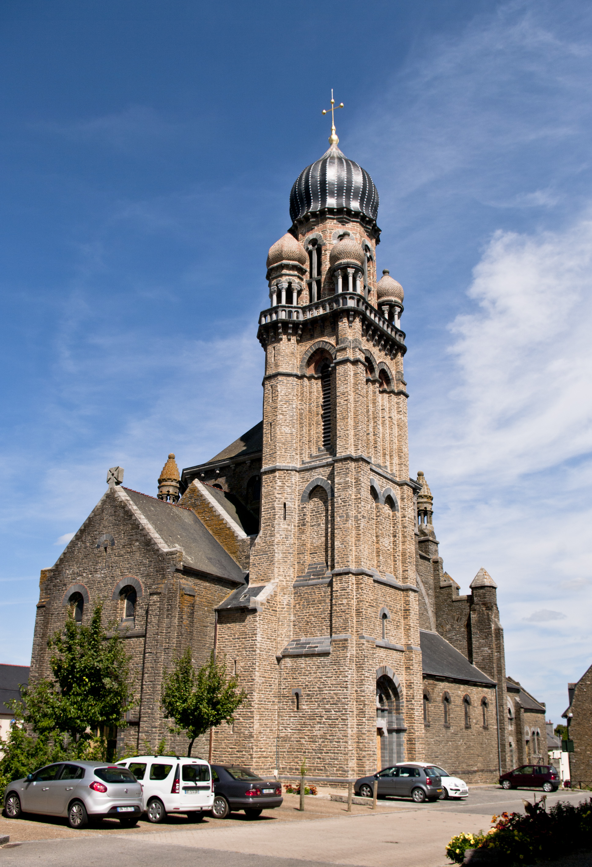 Église Saint-Maximilien Kolbe de Corps-Nuds dans le département d'Ille-et-Vilaine. Façades ouest et sud.